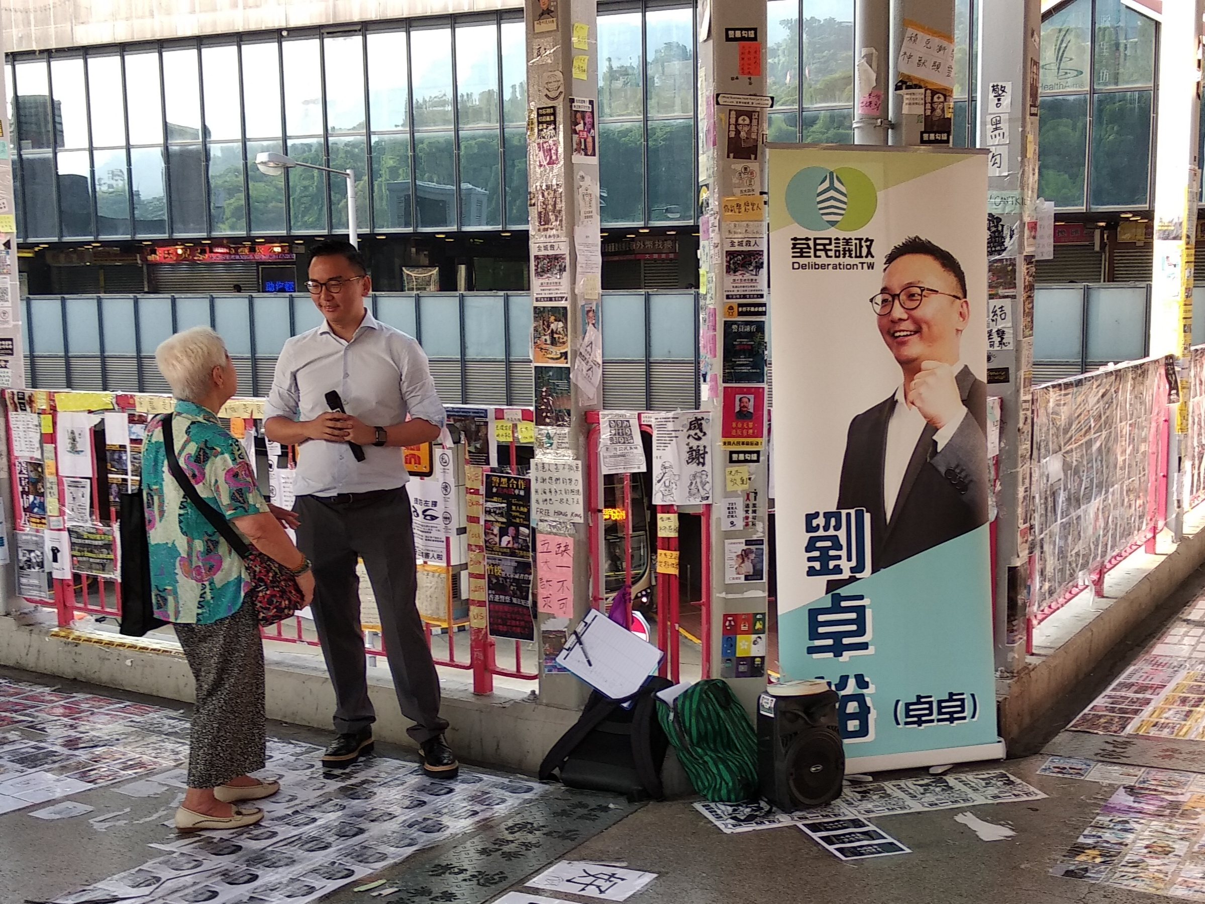 中文（香港）: 劉卓裕。